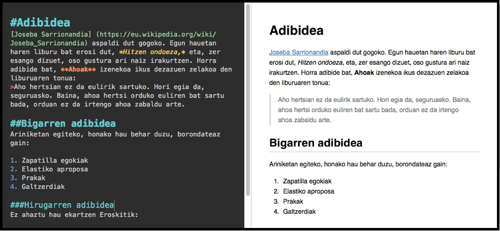 Horra zelan ikusten den Markdown testua ezkerrean eta HTML emaitza eskuinean, MacDown editorea erabilita